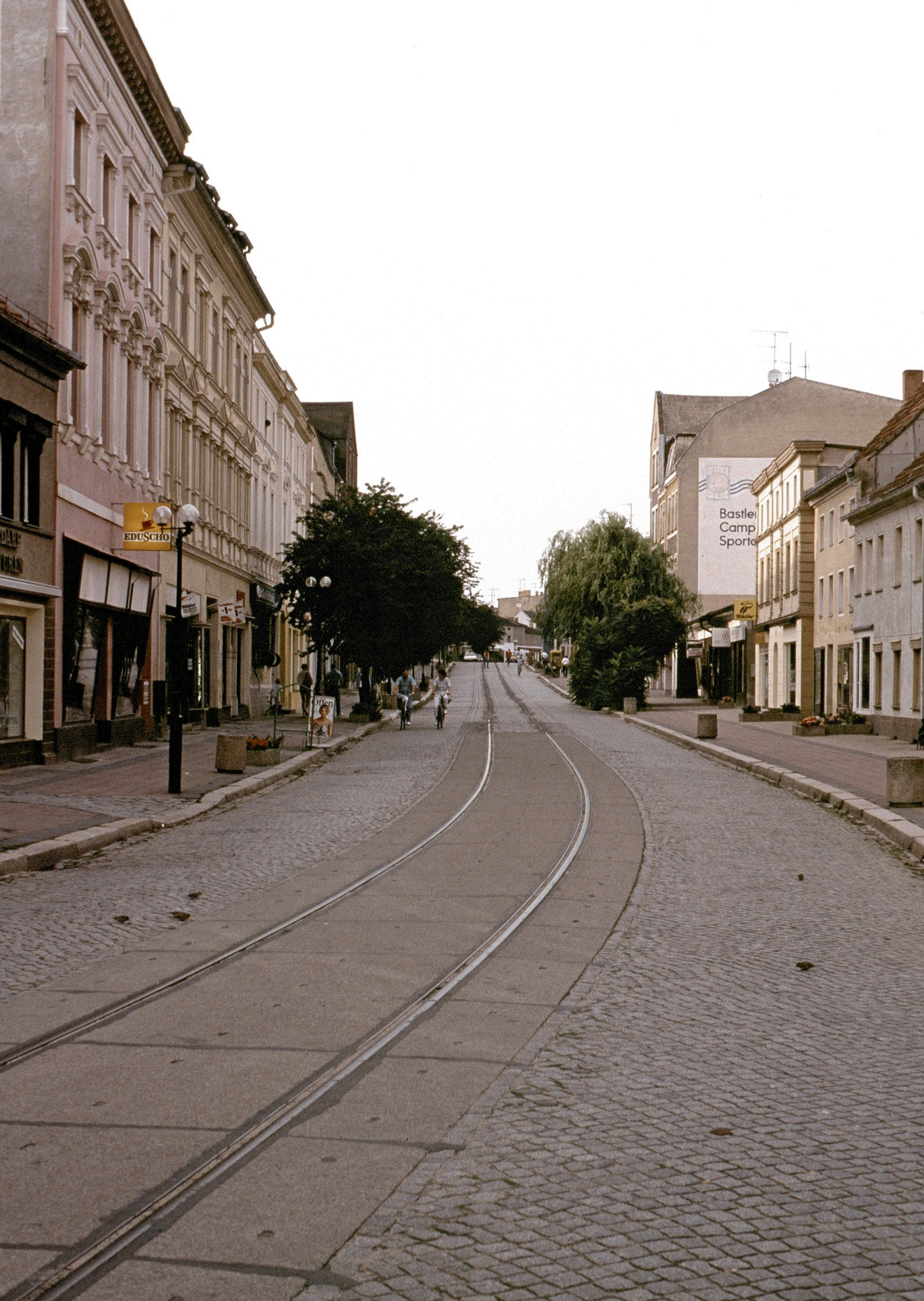 Strausberg Große Straße